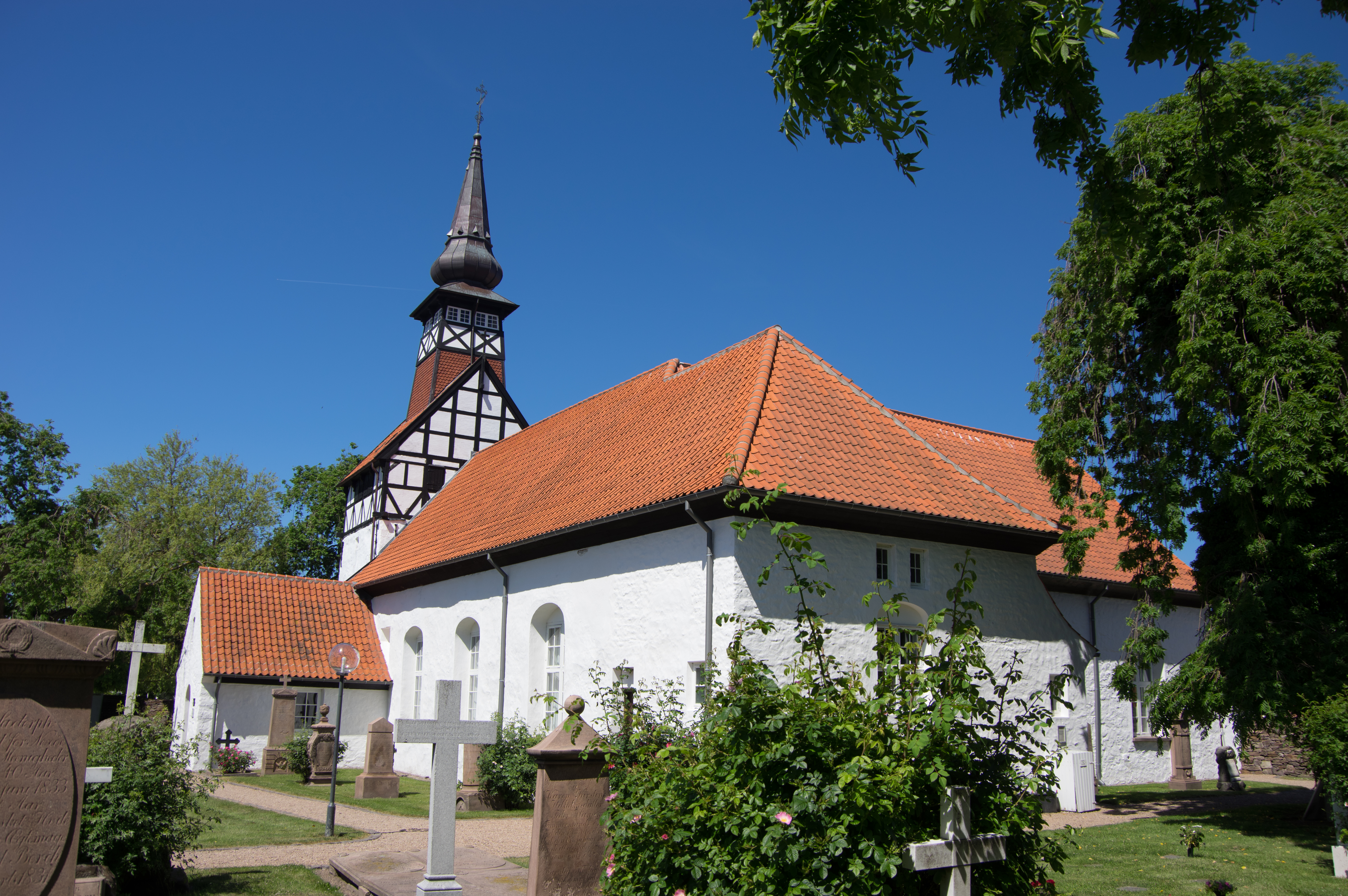 Nexo auf Bornholm. Die Kircvhe wurde wahrscheinlich um 1700 erbaut.